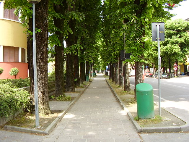 Fonte